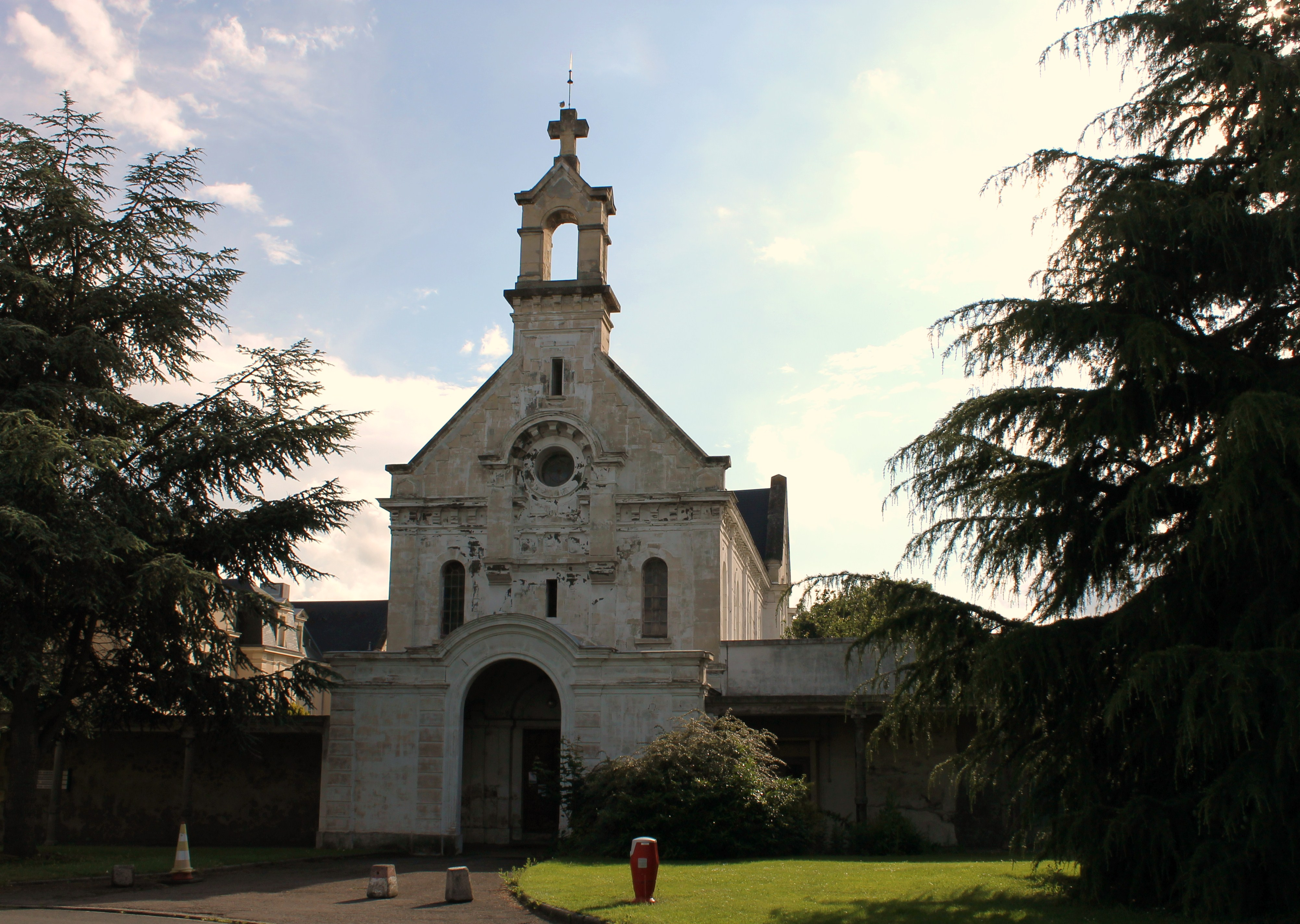 Chapelle de l'hôpital Clémenceau, Paroisse Saint André et Sainte Alexandra, Caen, Calvados, France